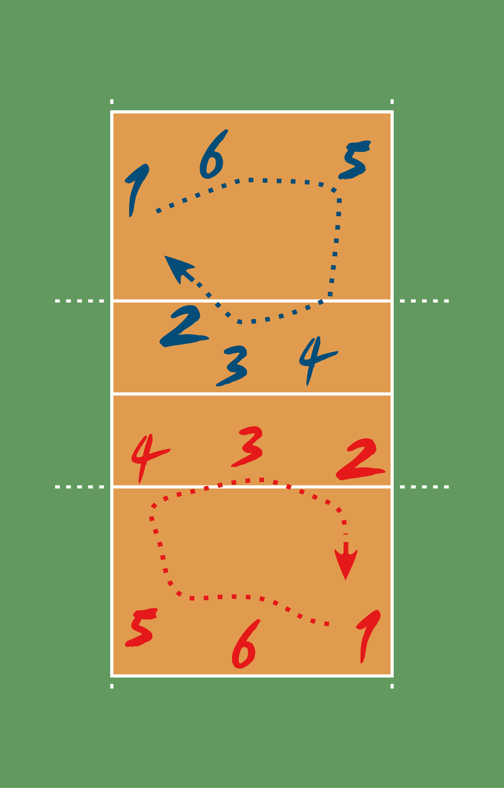 posicions i les rotacions del voleibol adaptat